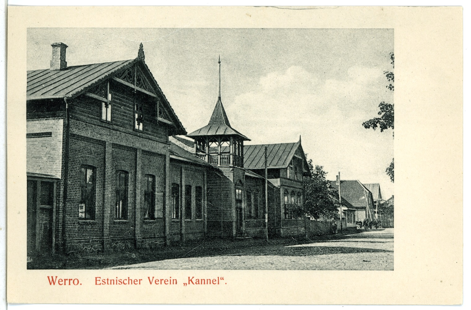 Werro; Estnischer Verein "Kannel" This postcard is from publisher Brück & Sohn in Meißen ( postcard has a unique number 07741 and is available in a higher resolution at the publisher. This images was uploaded in a cooperation project between Wikipedians and the publisher.